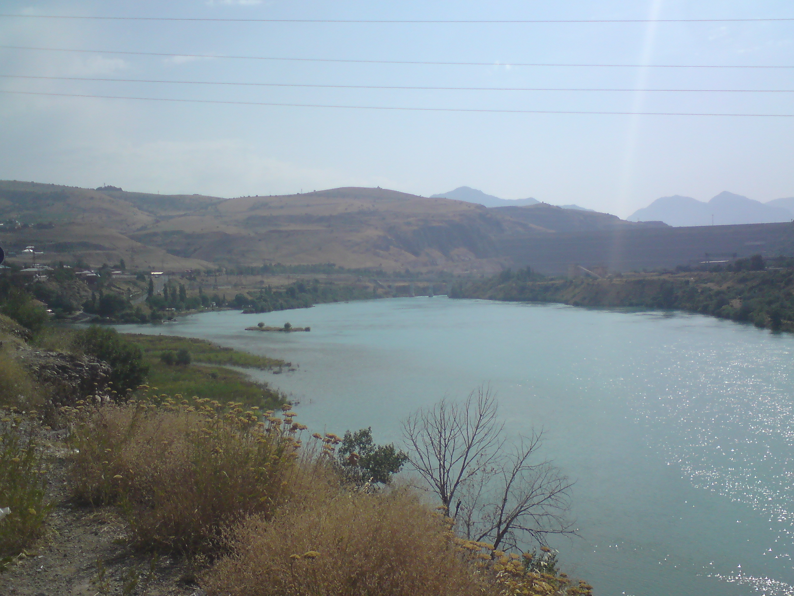 Впадение реки Угам в реку Чирчик ниже плотины Чарвакской ГЭС, Ташкентский вилоят